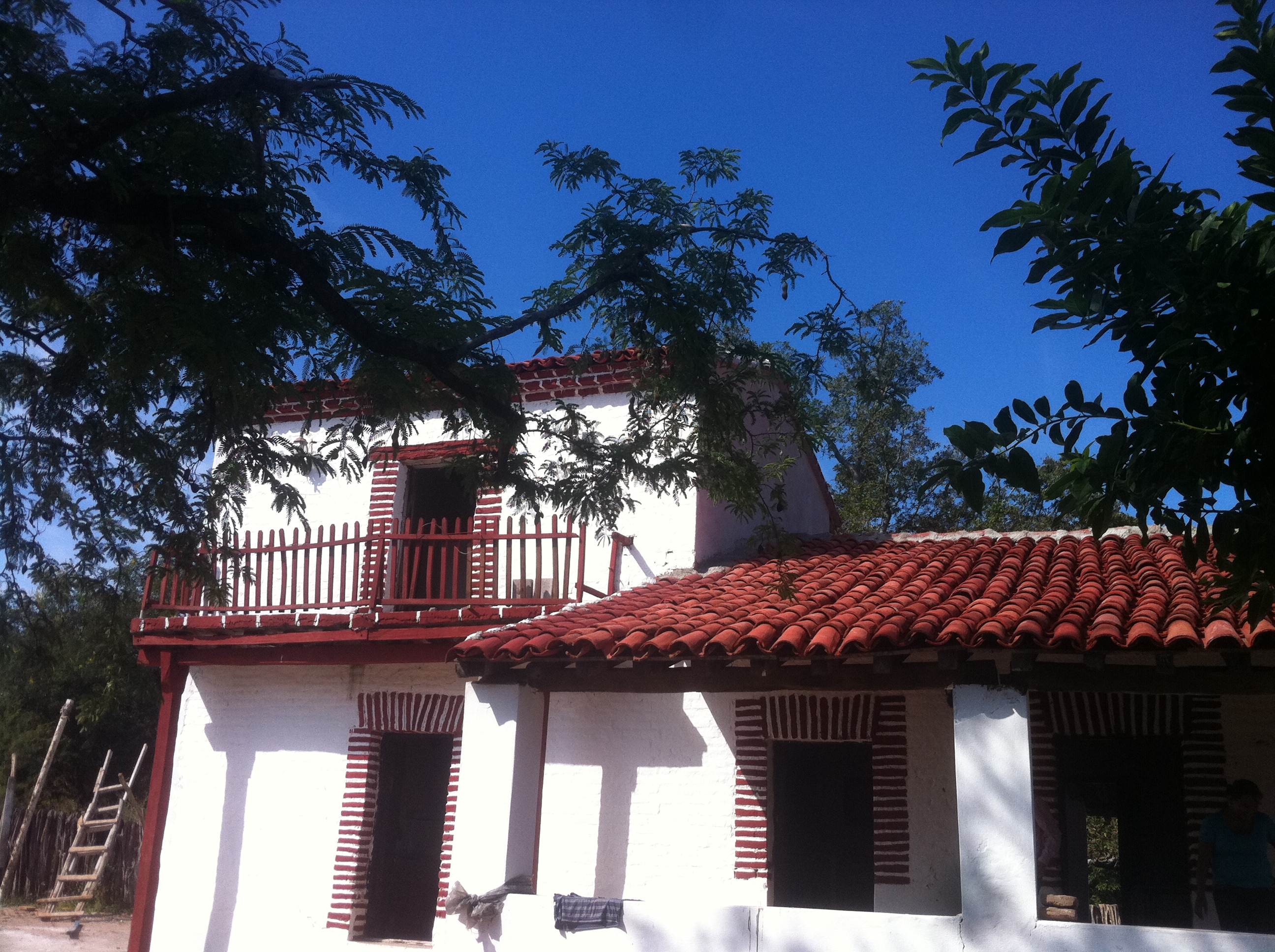 Fachada